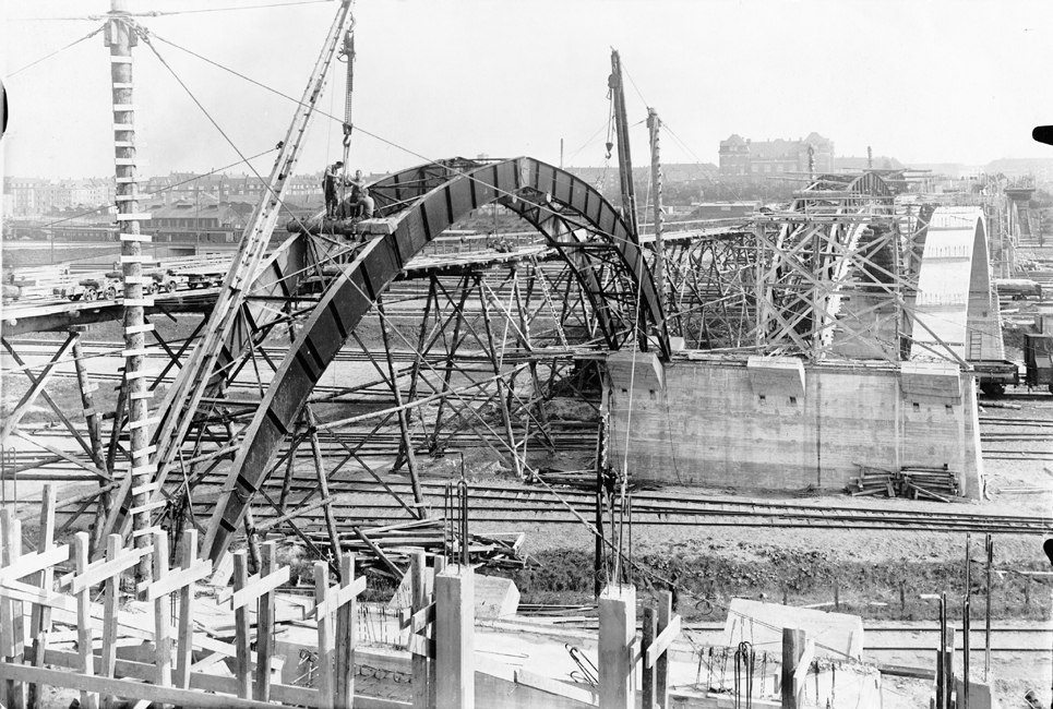 Ringgadebroen under opførelse i marts 1937.